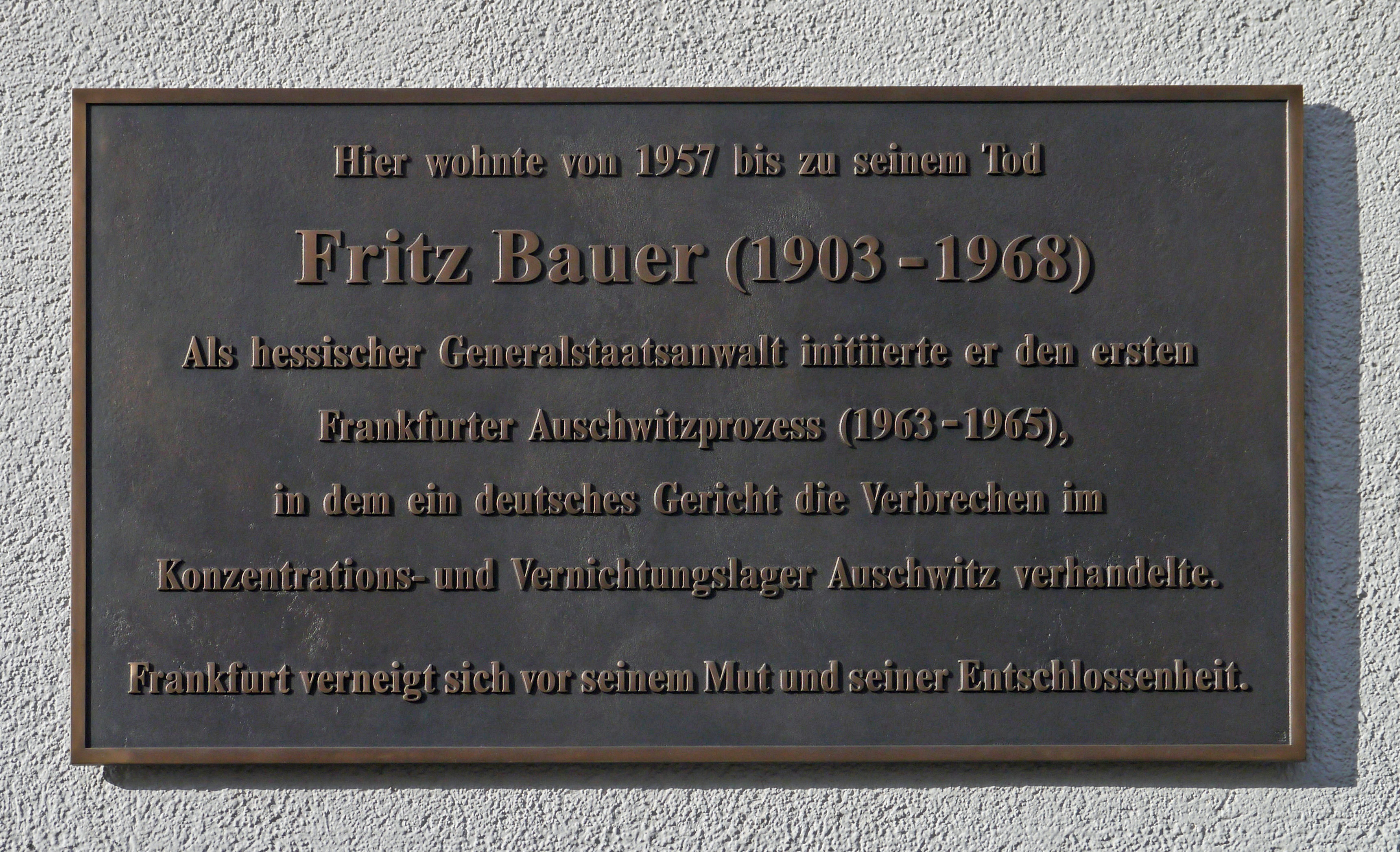 Gedenktafel am letzten Wohnhaus von Fritz Bauer. 2017 in der Feldbergstraße in Frankfurt am Main.